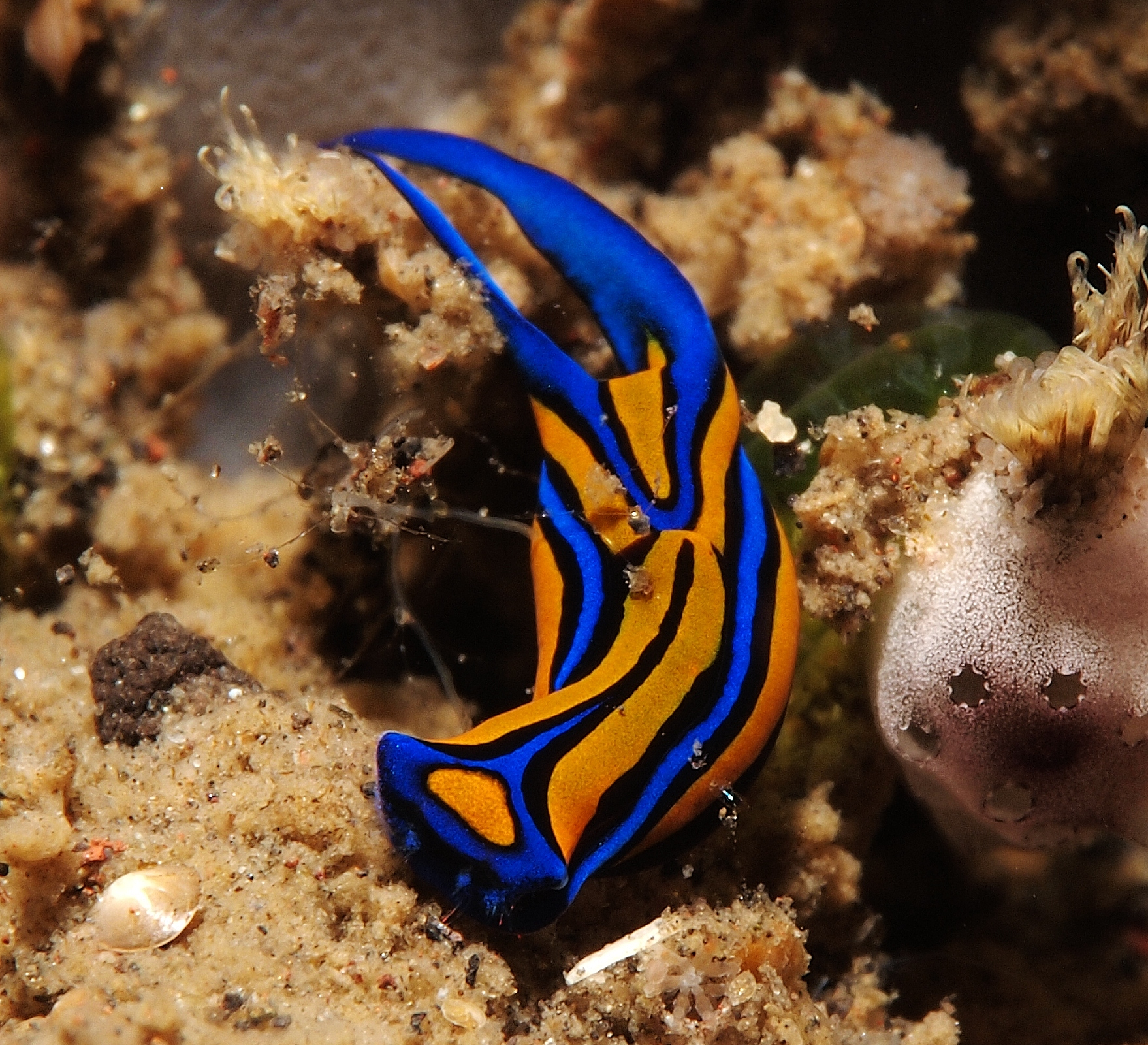 Chelidonura hirundinina, Tulamben, Bali, Indonesia